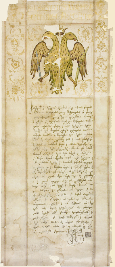 1712. ვახტანგ და ბაქარ ბატონიშვილების სითარხნის წიგნი სიონის მხატვარ გიორგისადმი